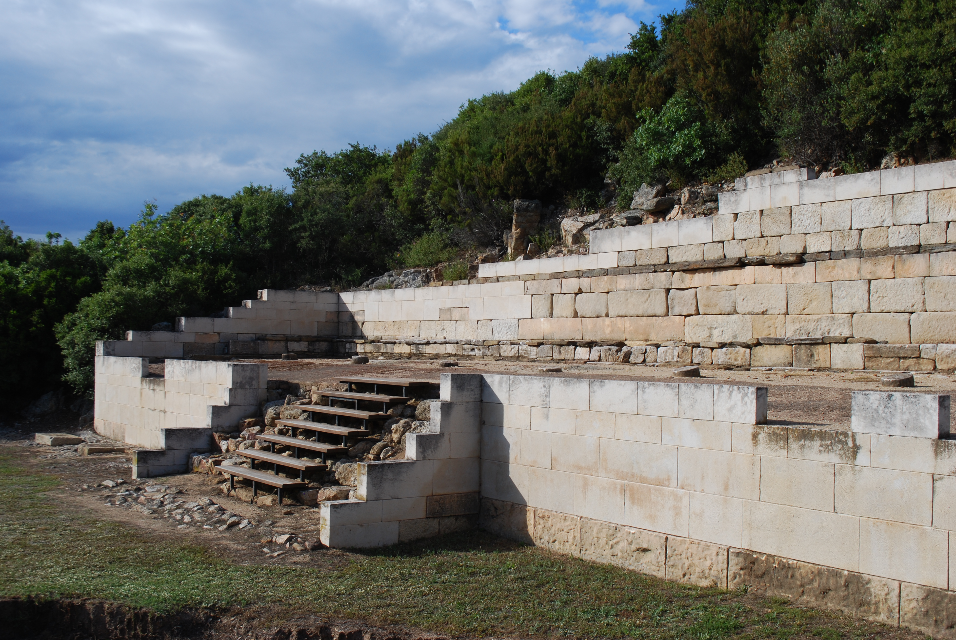 Vue du site archéologique de l'ancienne Stagire, ville natale du philosophe Aristote (Stagire, 384 av. J.-C. - Chalcis, 322 av. J.-C.).